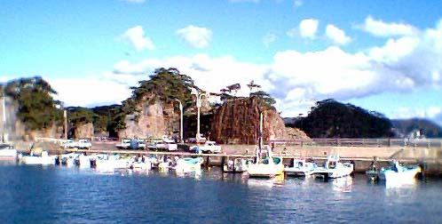 Ashitsuki Fishing Port in Shikine Port, Shikine Island, Niijima, Tokyo, Jp